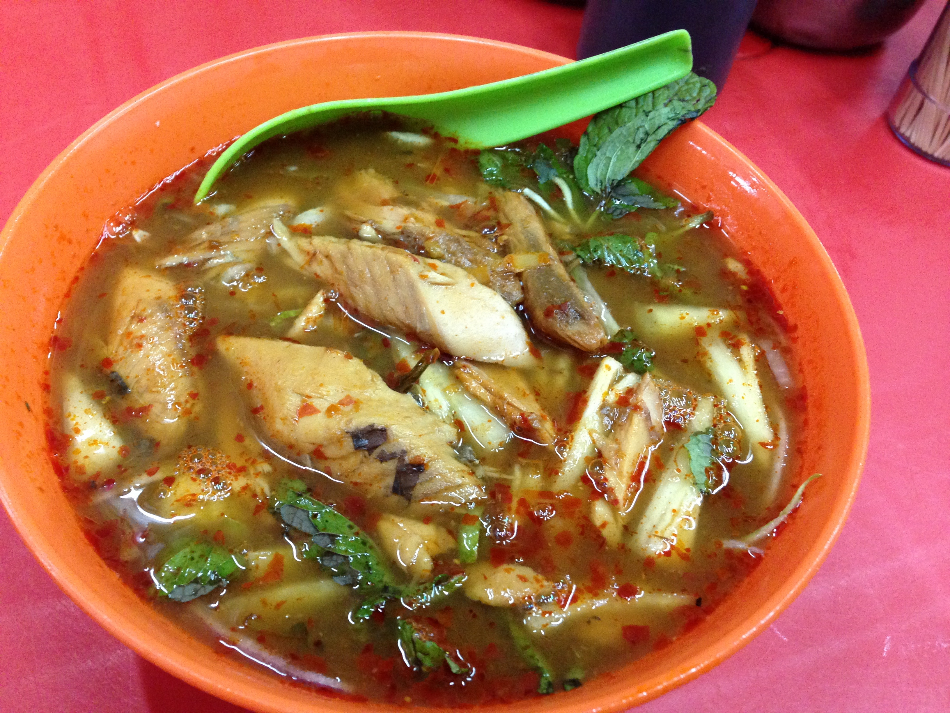 記錄老吉隆坡的一面，探索這裡的藝文空間，嘆息發展巨輪的摧殘。